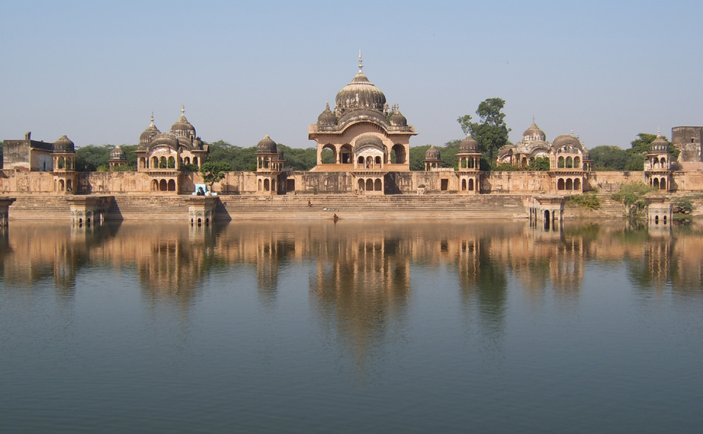 Kusuma_Sarovar Ghat Vrindavan